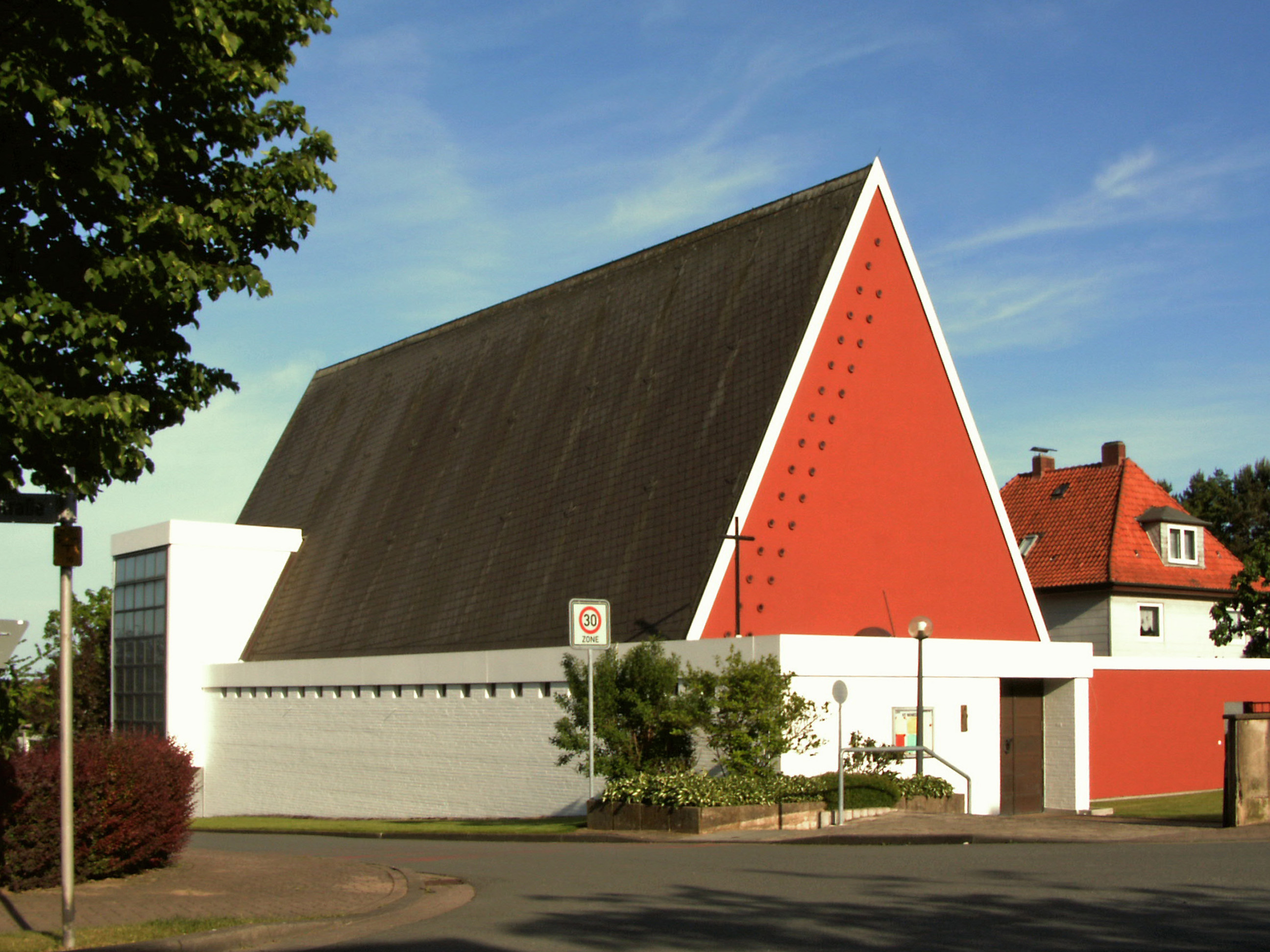 Katholische Kirche St. Benedikt in Lauenstein, Ortsteil von Salzhemmendorf